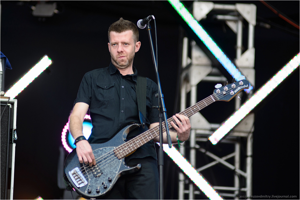 Николай Ротов, группа "Смысловые Галлюцинации", фестиваль "Рок над Волгой" 2013